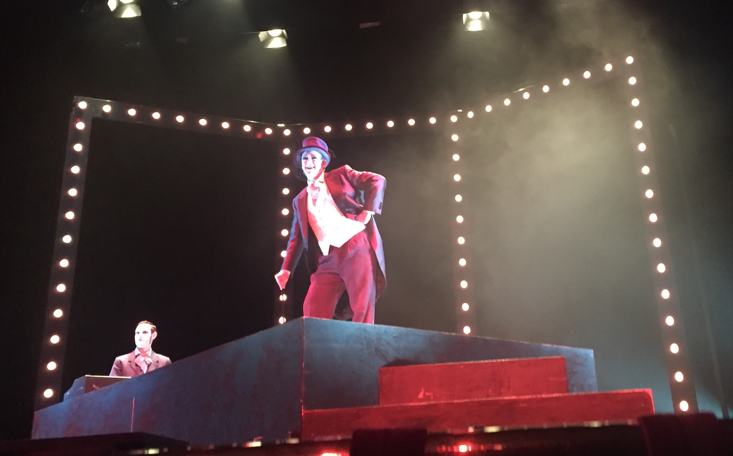 Simplicissimus antzezlana